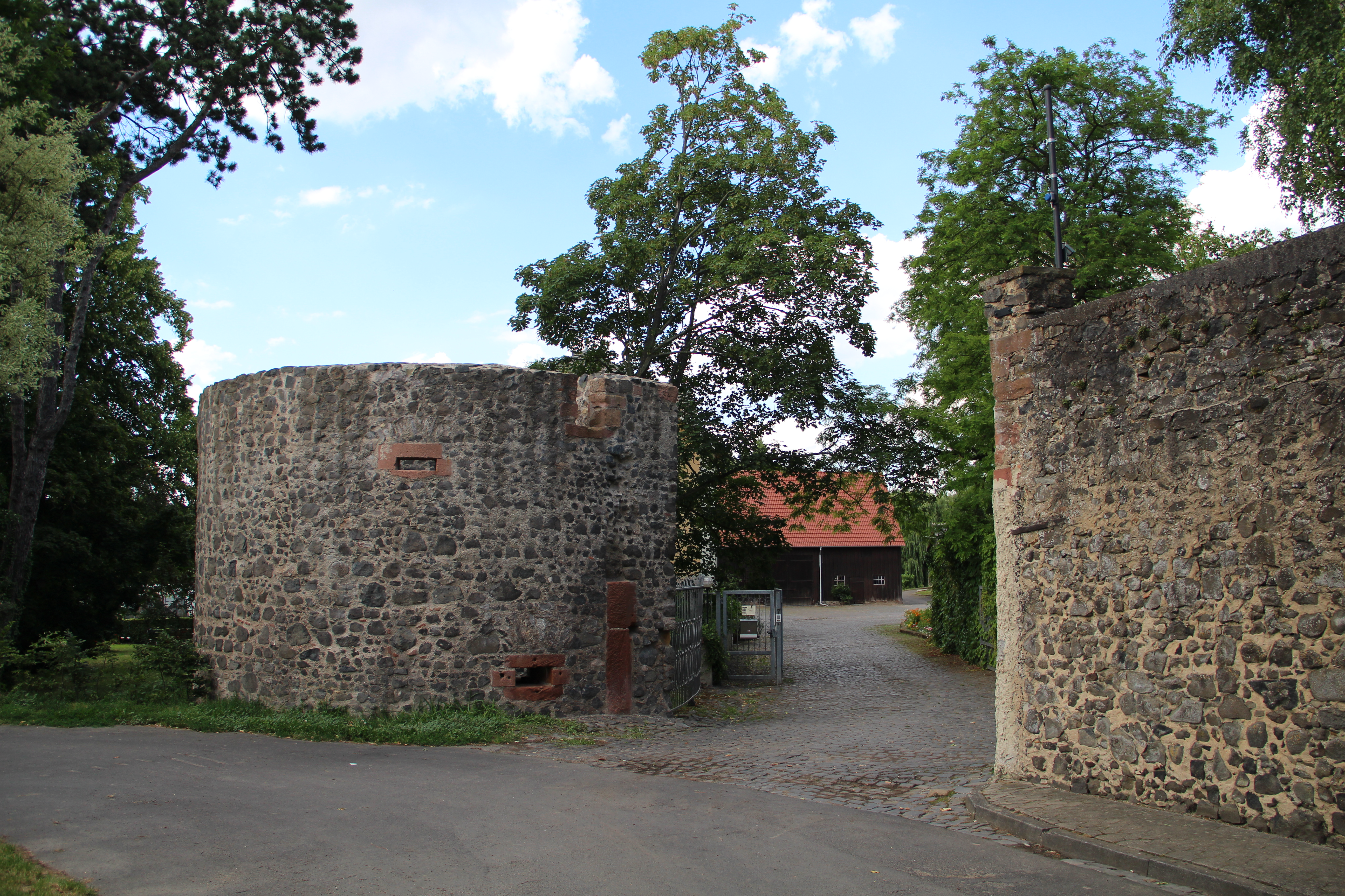 Dorheim